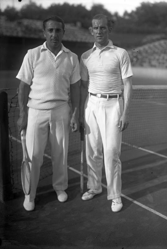 Der deutsche Tennismeister Moldenhauer tödlich verunglückt! Der deutsche Tennismeister Moldenhauer (rechts) verunglückte mit seinem Automobil tödlich in Berlin. Unser Bild zeigt ihn mit Clubkameraden Prenn (links) das erfolgreiche deutsche Tennismeisterpaar im Davis-Pokal.